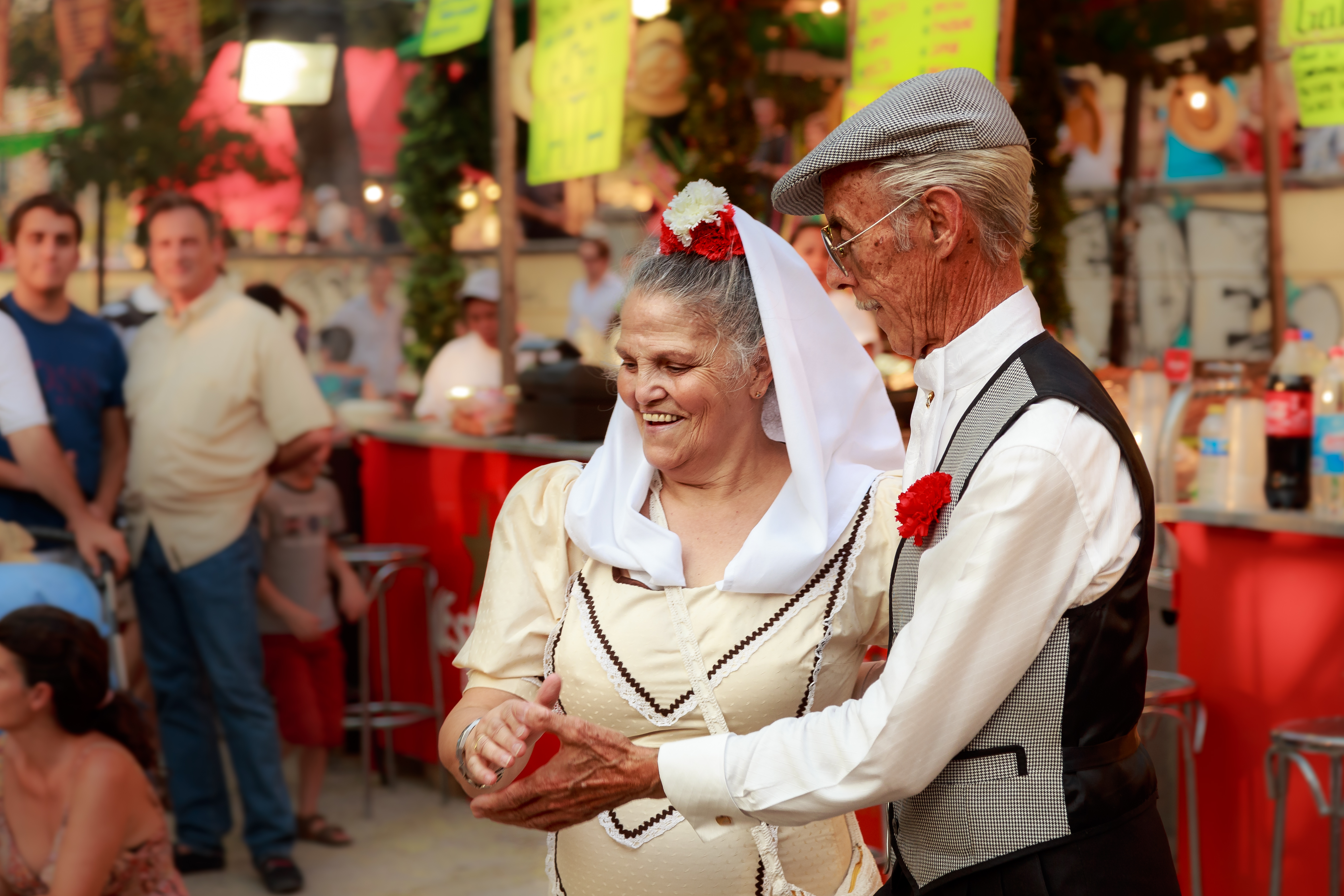 Chulapos bailando chotis en las Vistillas. Fiestas de la virgen de la Paloma, Madrid.